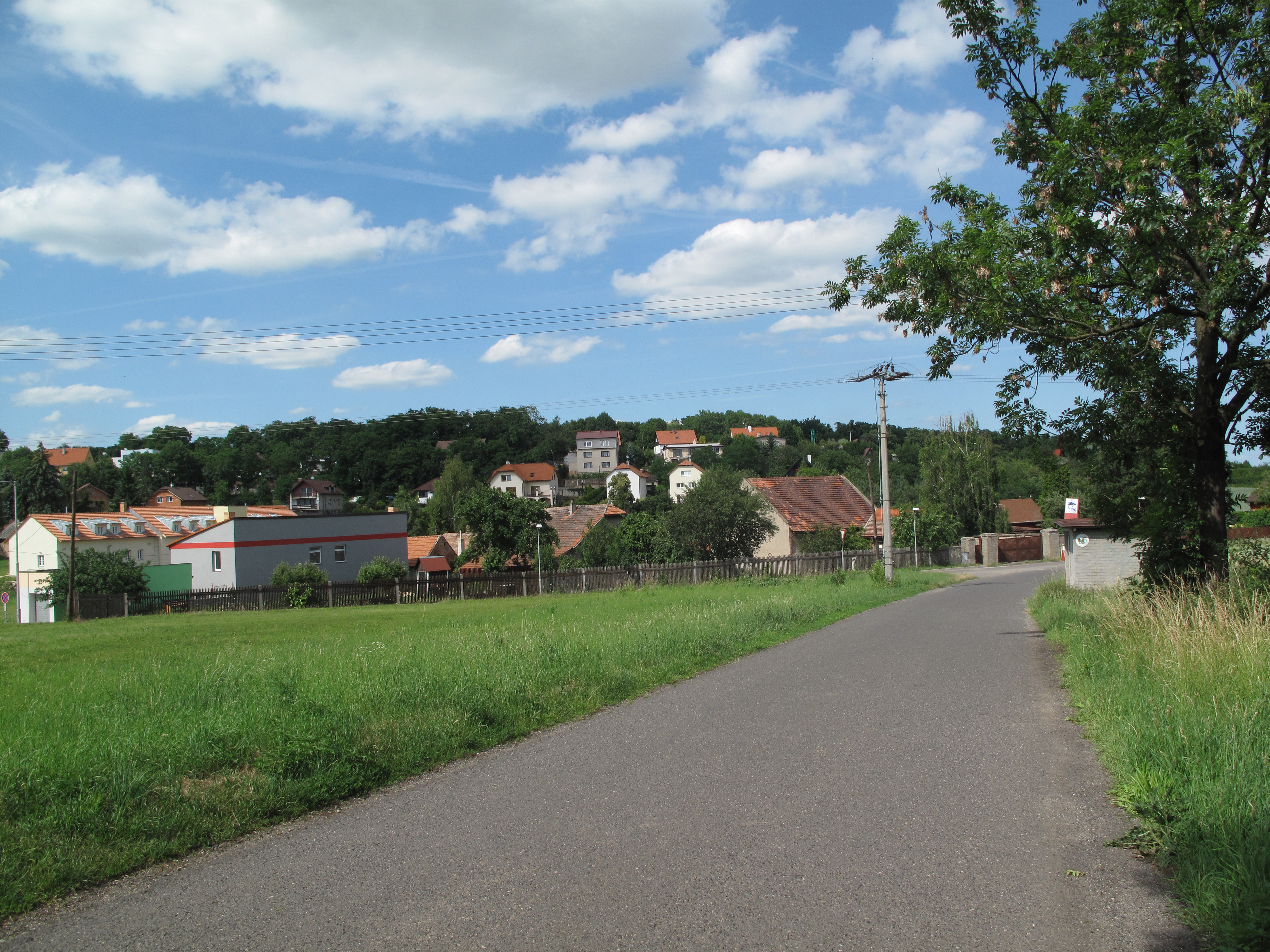 Sedlec, obec v okrese Praha-východ